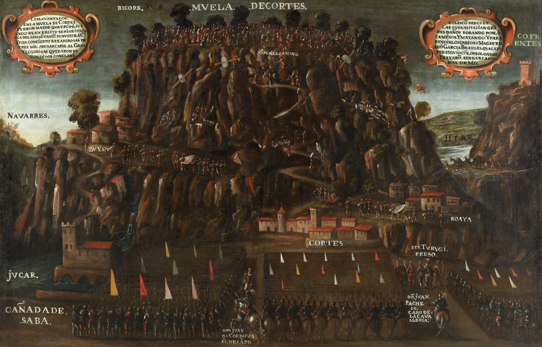 Miniatura escena de la Resistencia Armada Morisca en contra de la Expulsión en la Muela de Cortes.